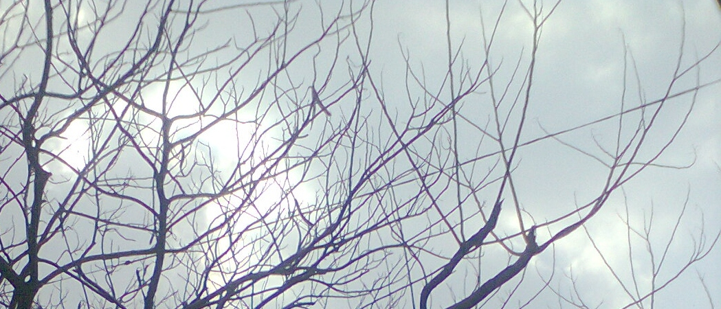 காய்ந்த மரத்தைச் சங்க இலக்கியம் முளிமரம் எனக் குறிப்பிடுகிறது. படத்தில் காணப்படுவது ஒரு முளிமரம். own shot